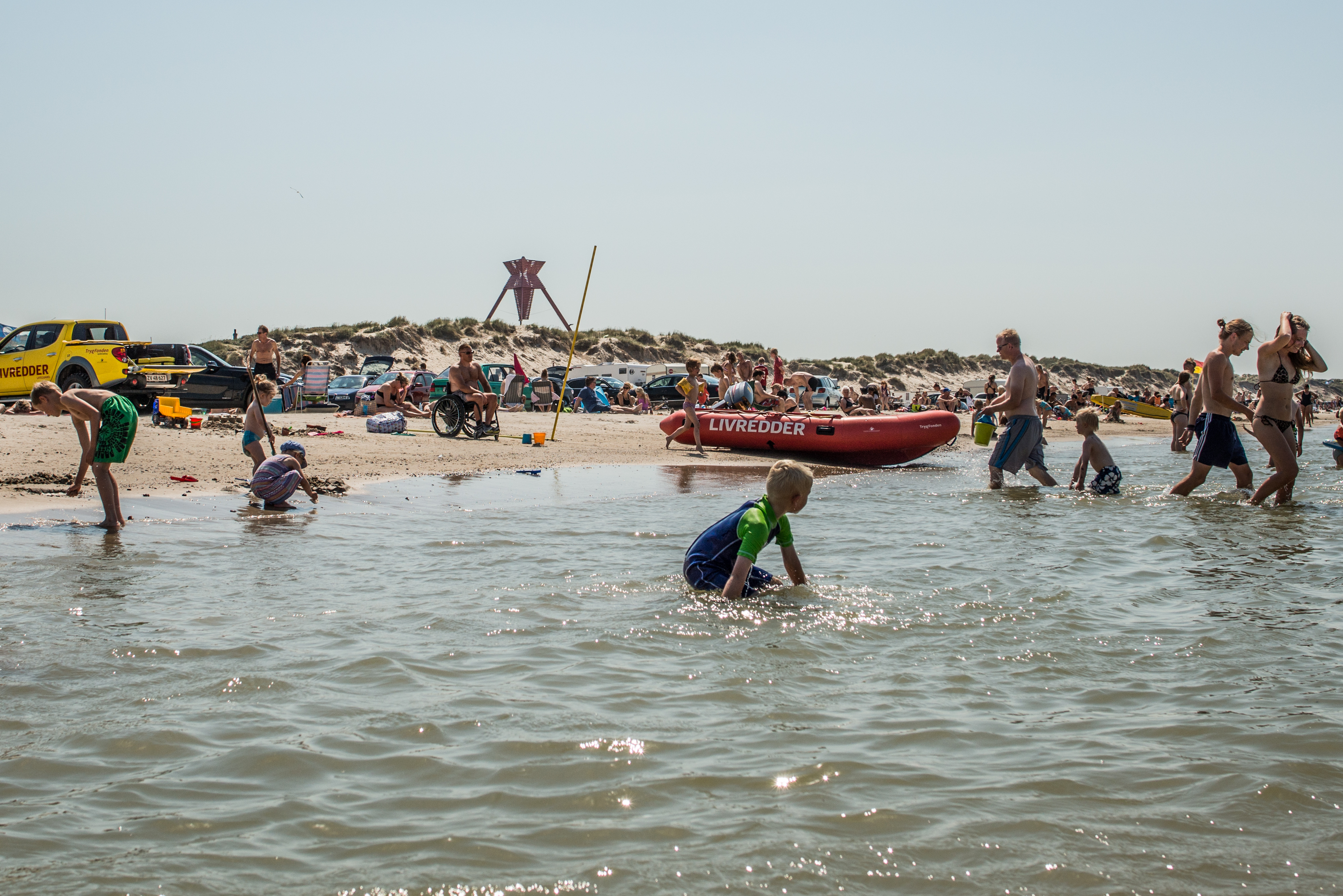 Blokhus Stranden 2014